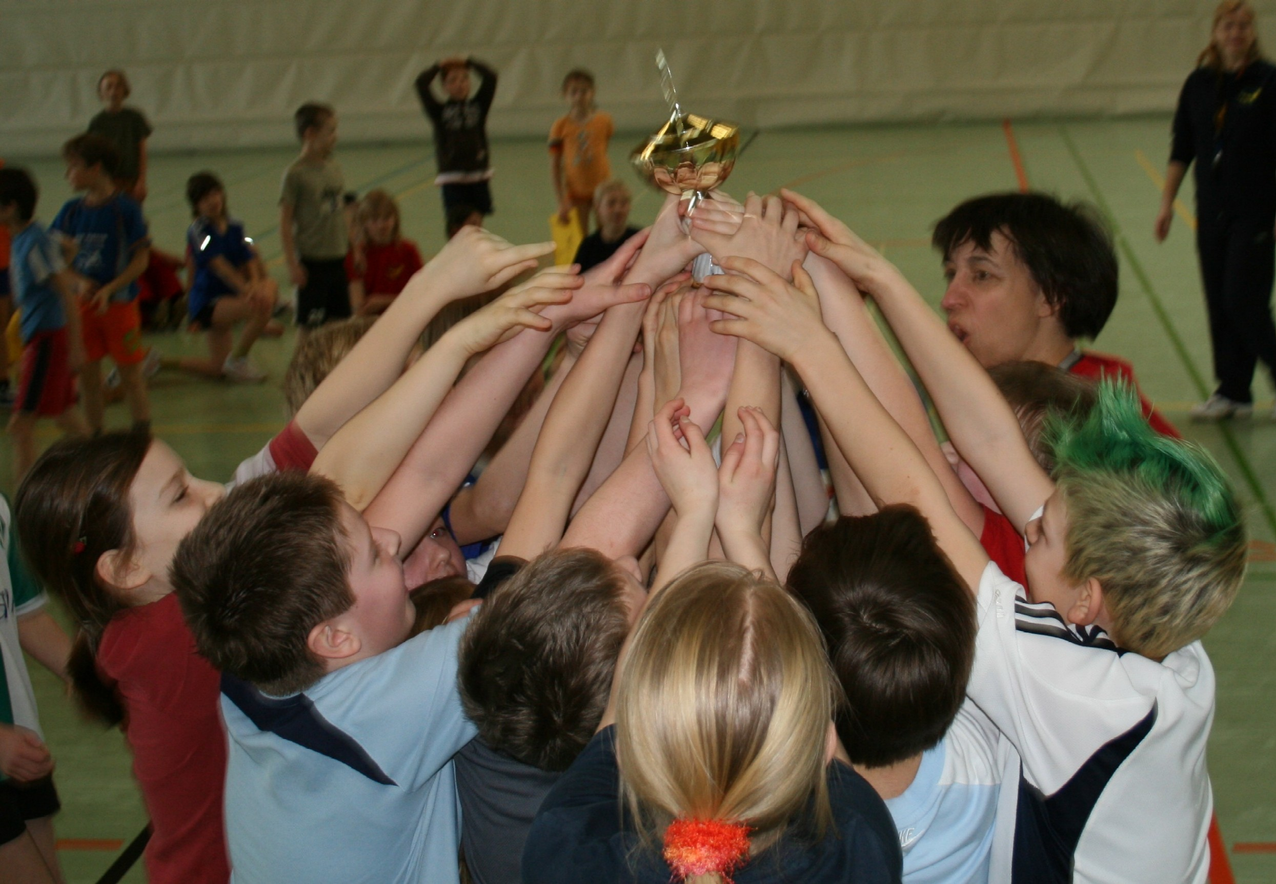 Sieg der Schulmannschaft Zweifelderball 2009 der Waldgrundschule Hohen Neuendorf